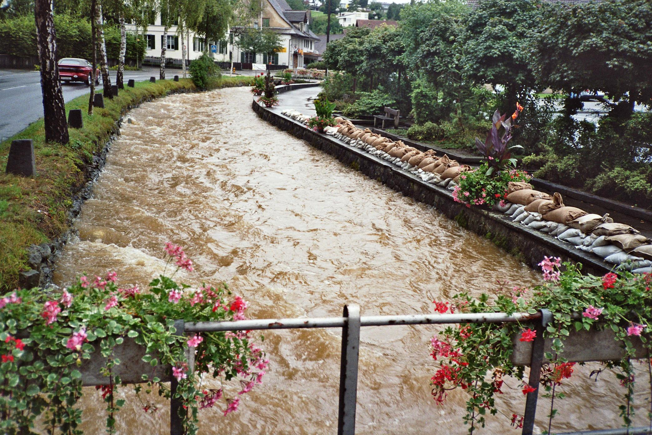 Der Jonenbach verursachte zwar keine Schäden – trotzdem musste die Feuerwehr Sandsäcke stapeln